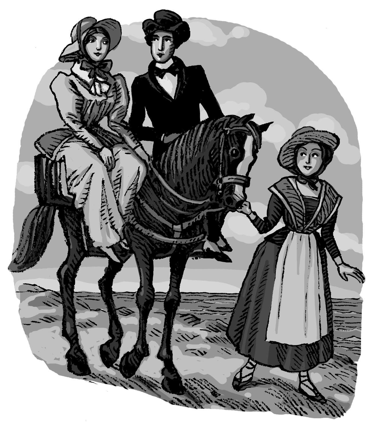 Cacolet au Pays basque, XIXe siècle.